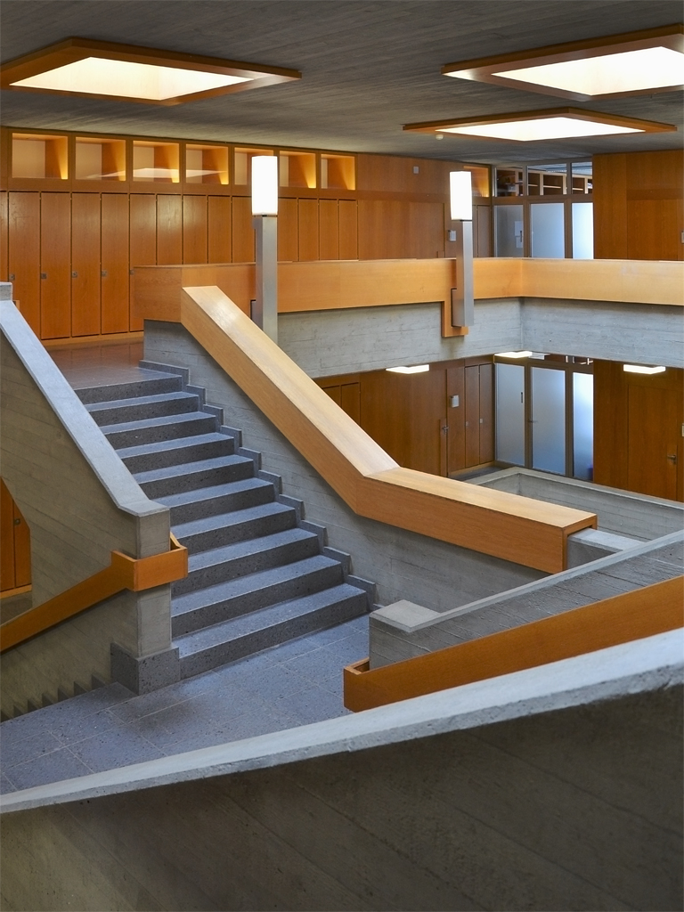 Neubau der Kantonsschule Schaffhausen von Innen